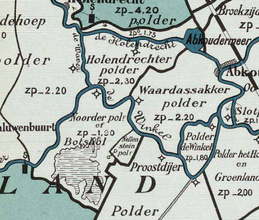 Nellenstein